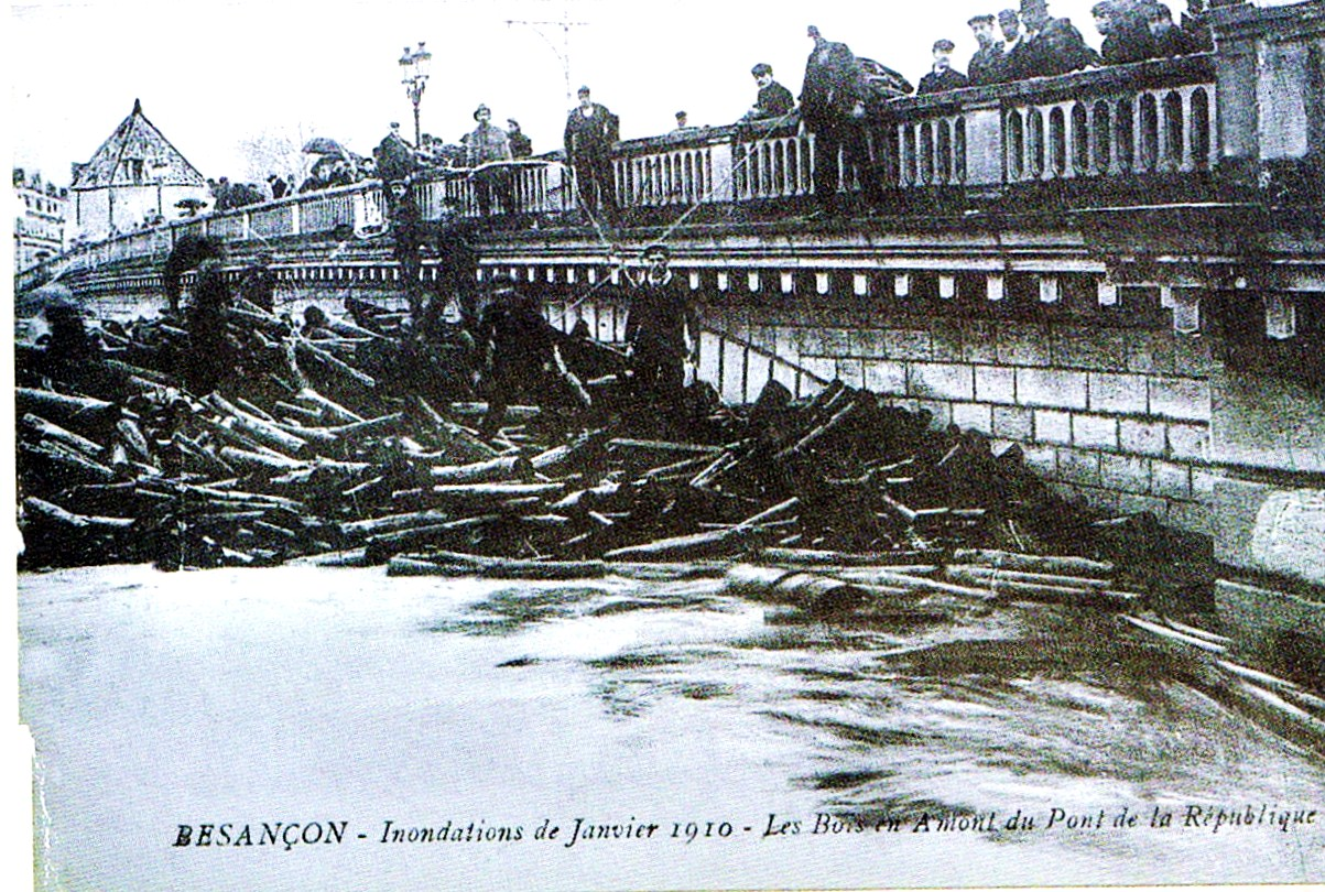 Le pont de la République de Besançon, lors de la crue de janvier 1910